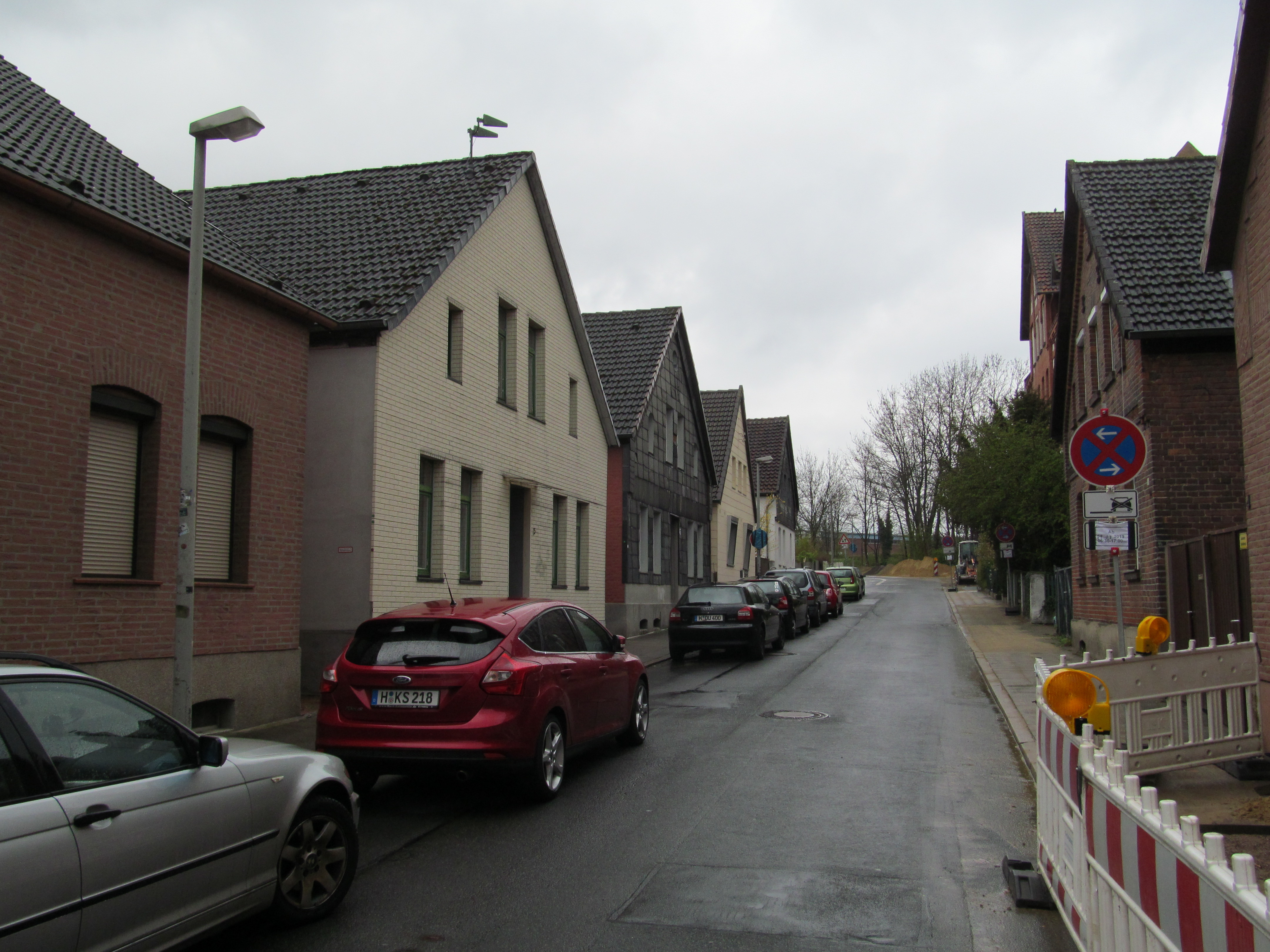 Blick von der Harenberger Straße in Hannover in die Dieselstraße